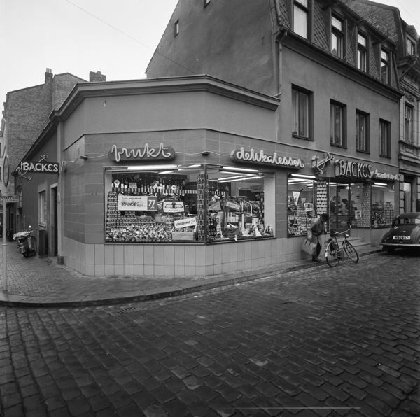 Backes skeppshandel vid korsningen Bruksgatan och Möllegränden i Helsingborg 1958.